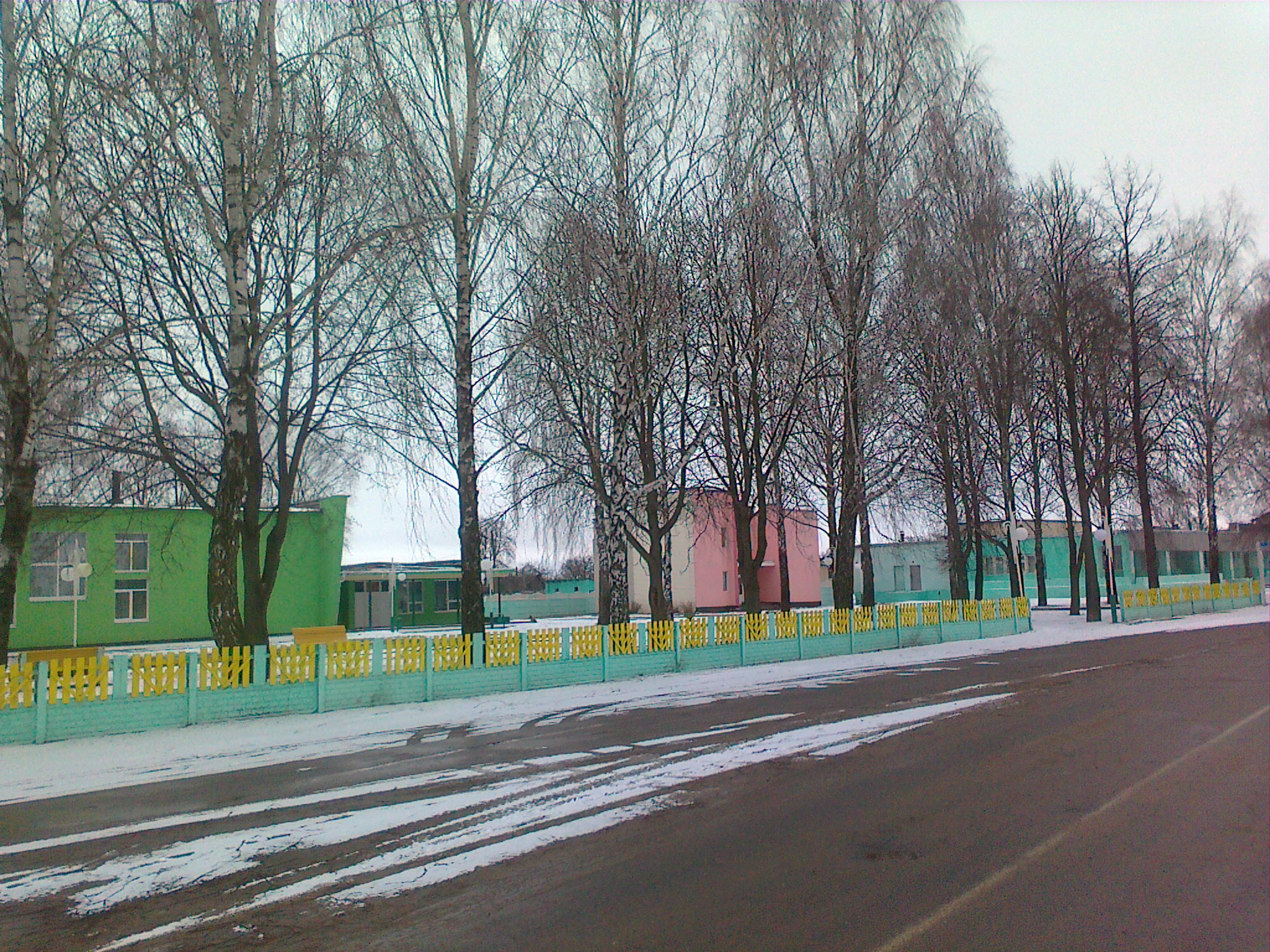 Аграгарадок Кавалi, вулiца Цэнтральная